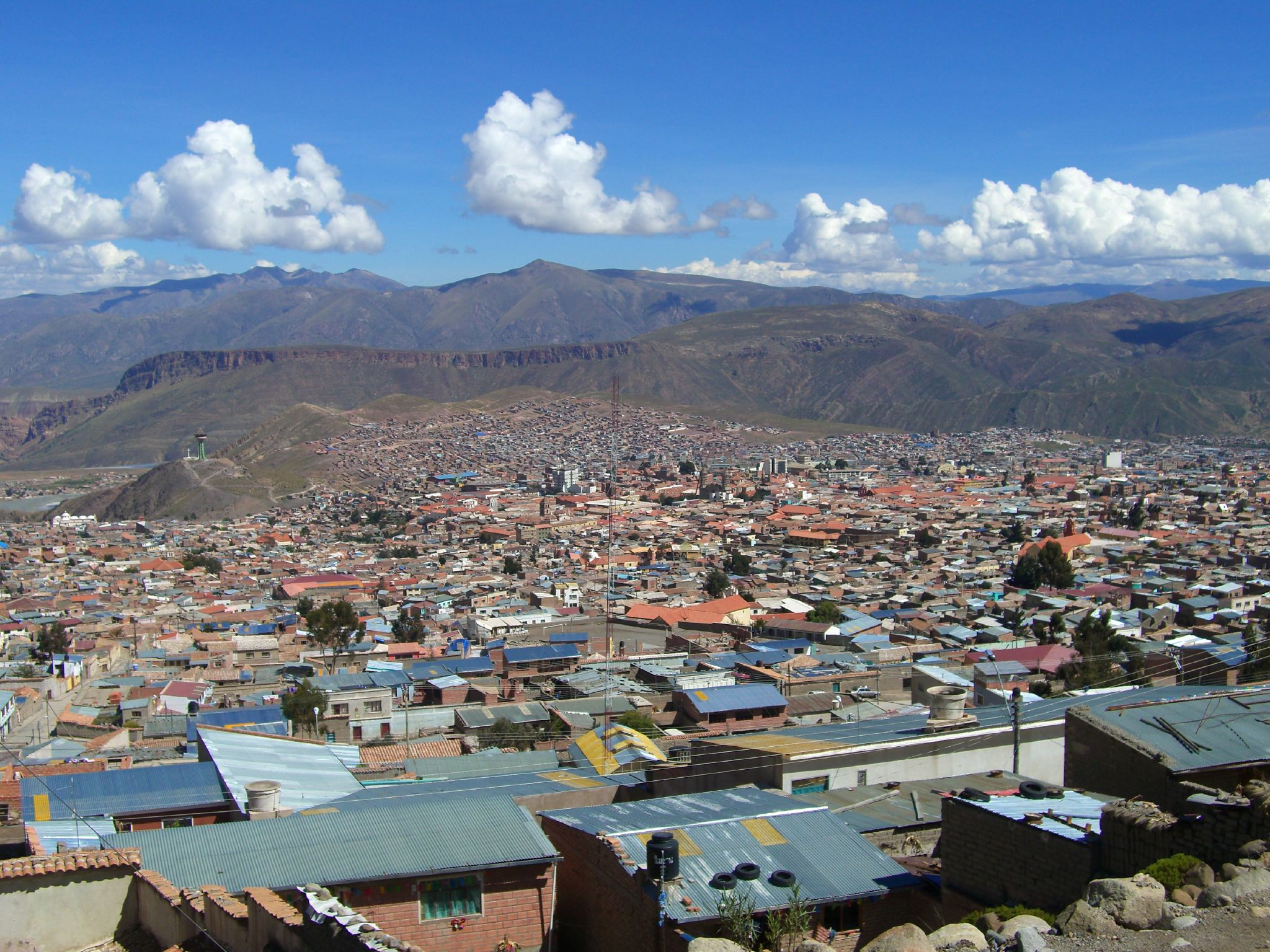 Potosi